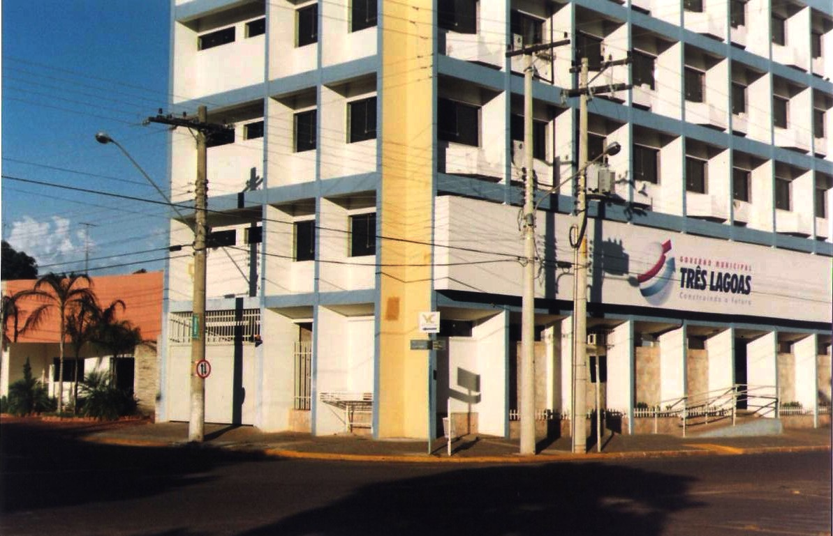 Descrição: Nova Prefeitura de Três Lagoas, Mato Grosso do Sul, Brasil. 2007.